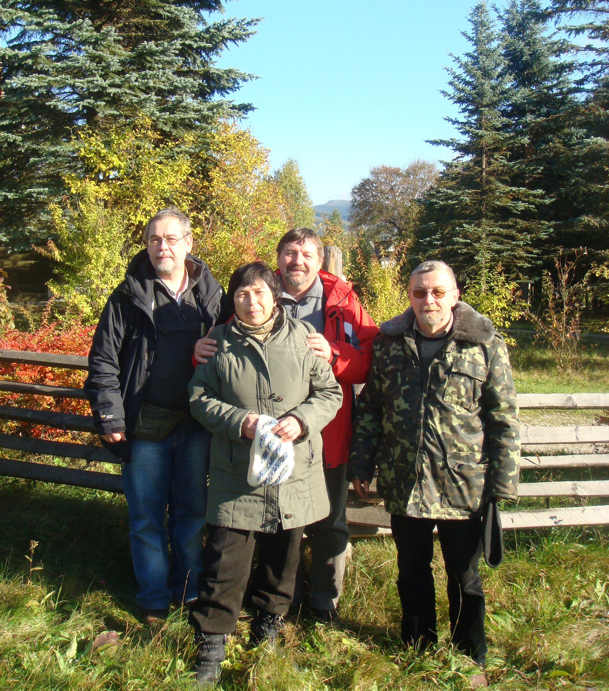 теріологи, що були засновниками та учасниками від 1 до 20 теріологічних шкіл (Ігор Загороднюк, Зоя Селюніна, Василь Покиньчереда, Олександр Киселюк). фото з ювілейної ХХ теріошколи